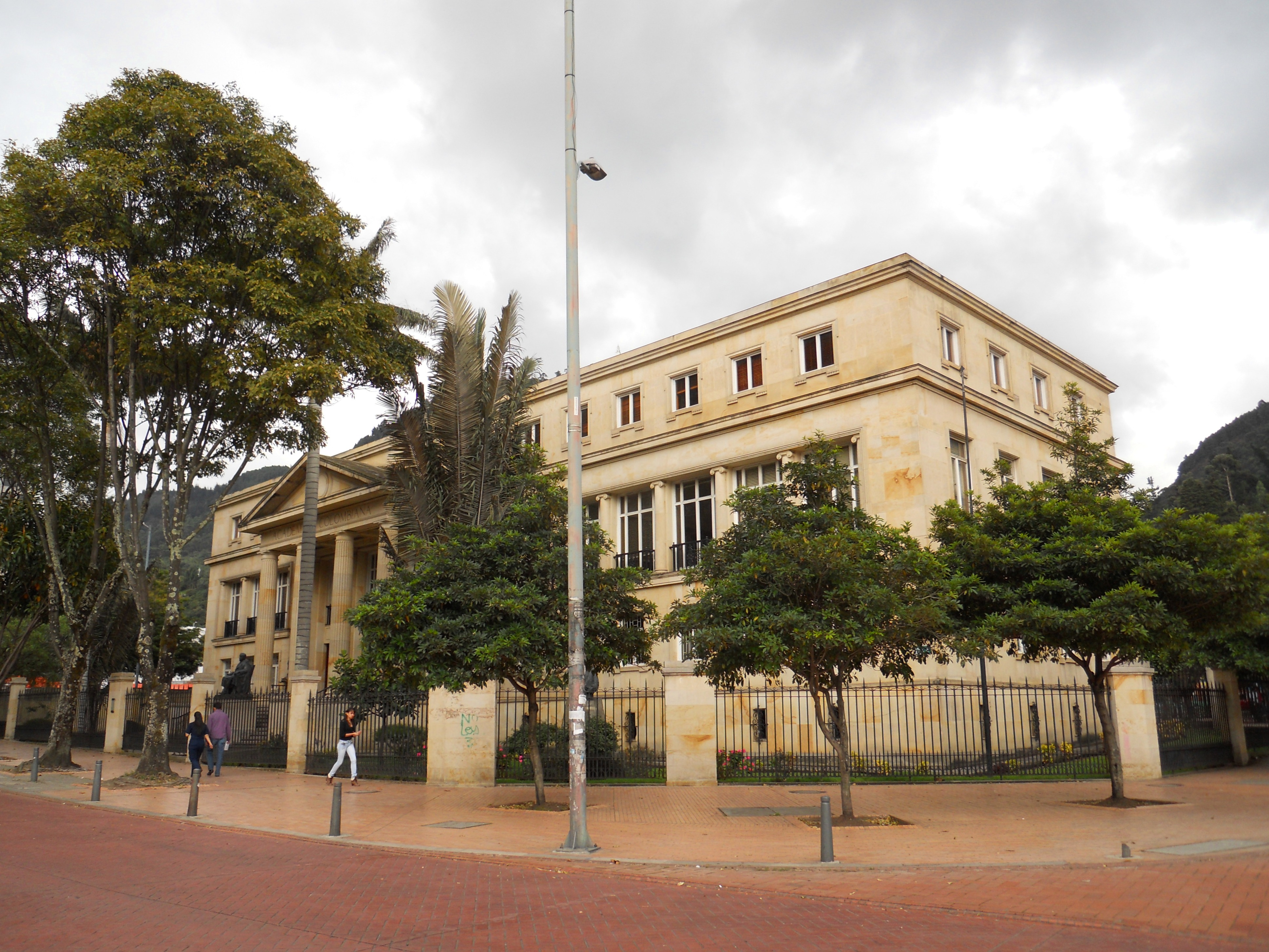 Centro de Bogotá. Academia Colombiana de la Lengua, carrera 3 con calle 18. Localidad de Santa Fe.